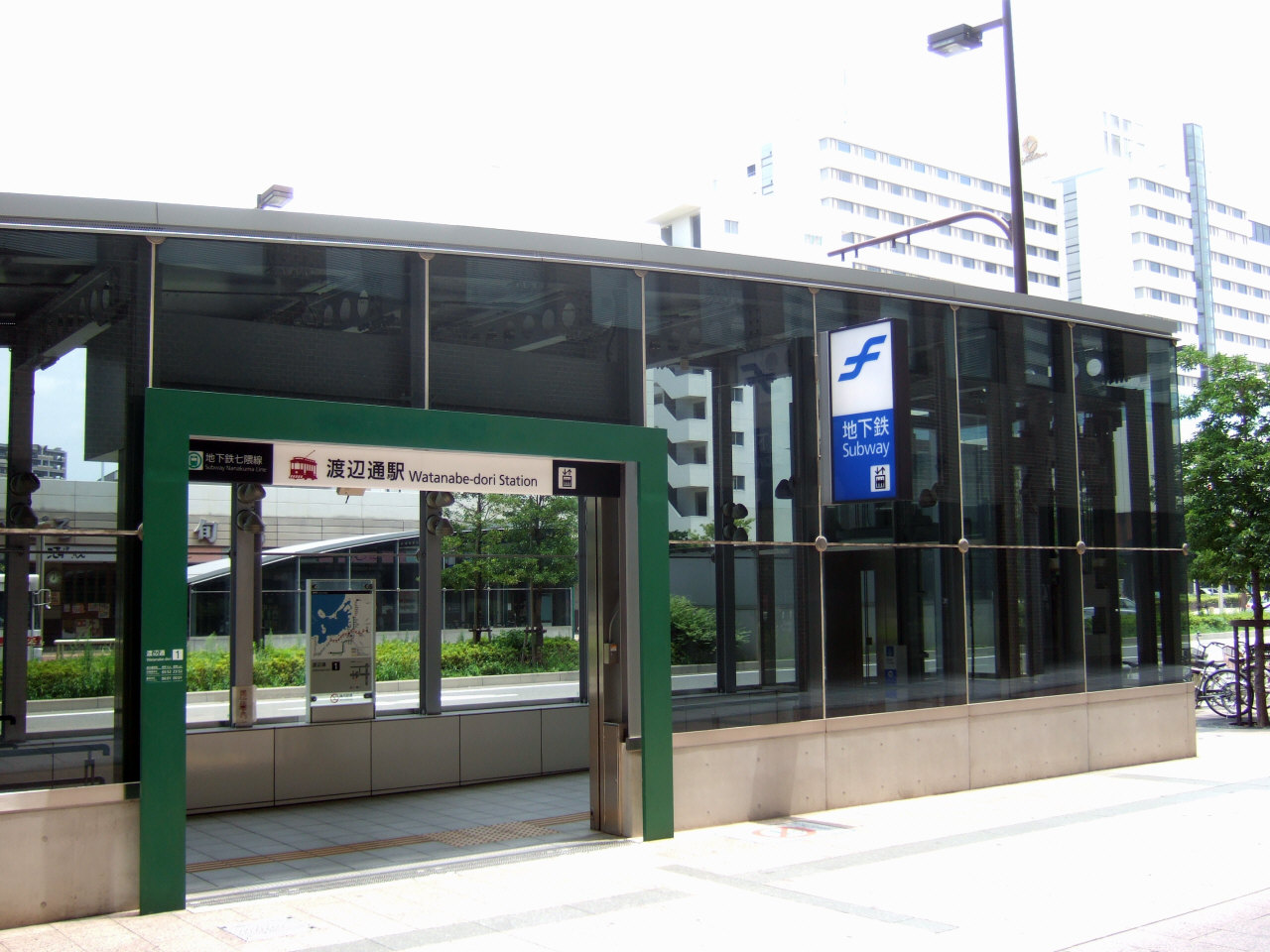 福岡市地下鉄渡辺通駅